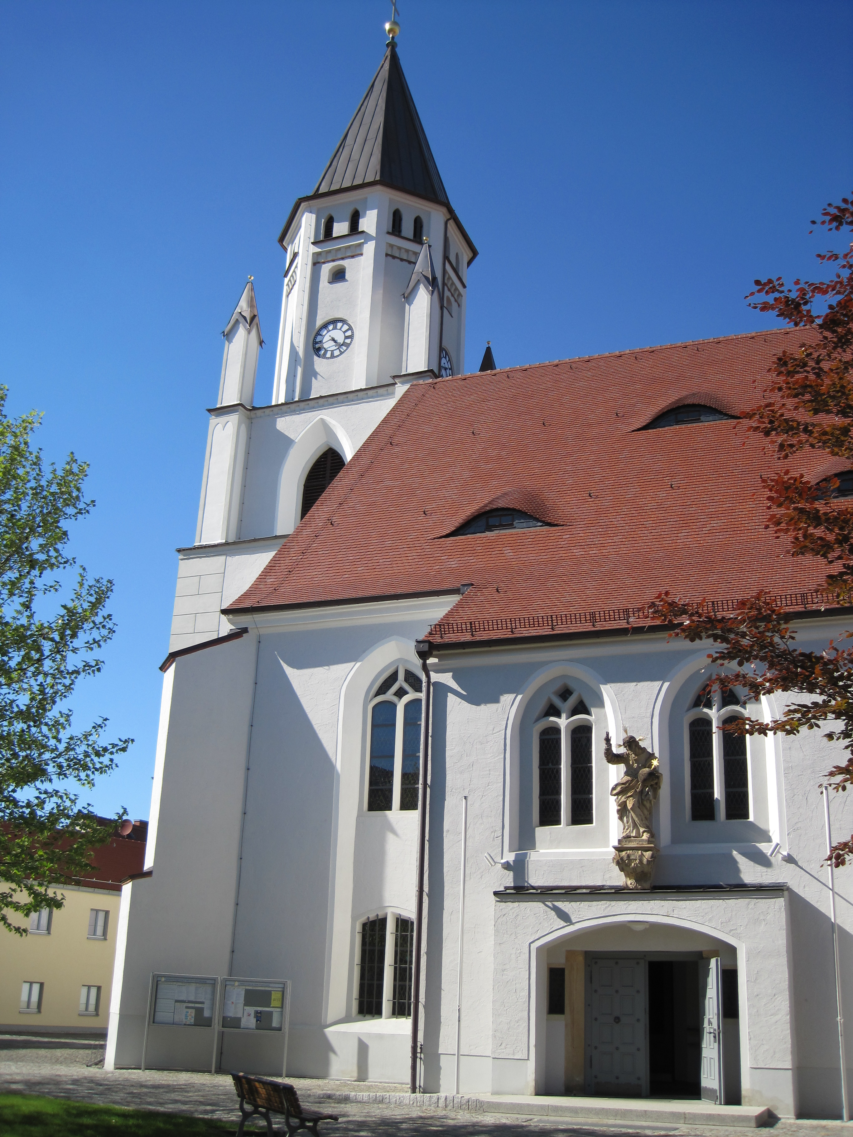 Pfarrkirche Wittichenau Südseite Hornjoserbsce: Kulowska wosadna cyrkej; južny bok